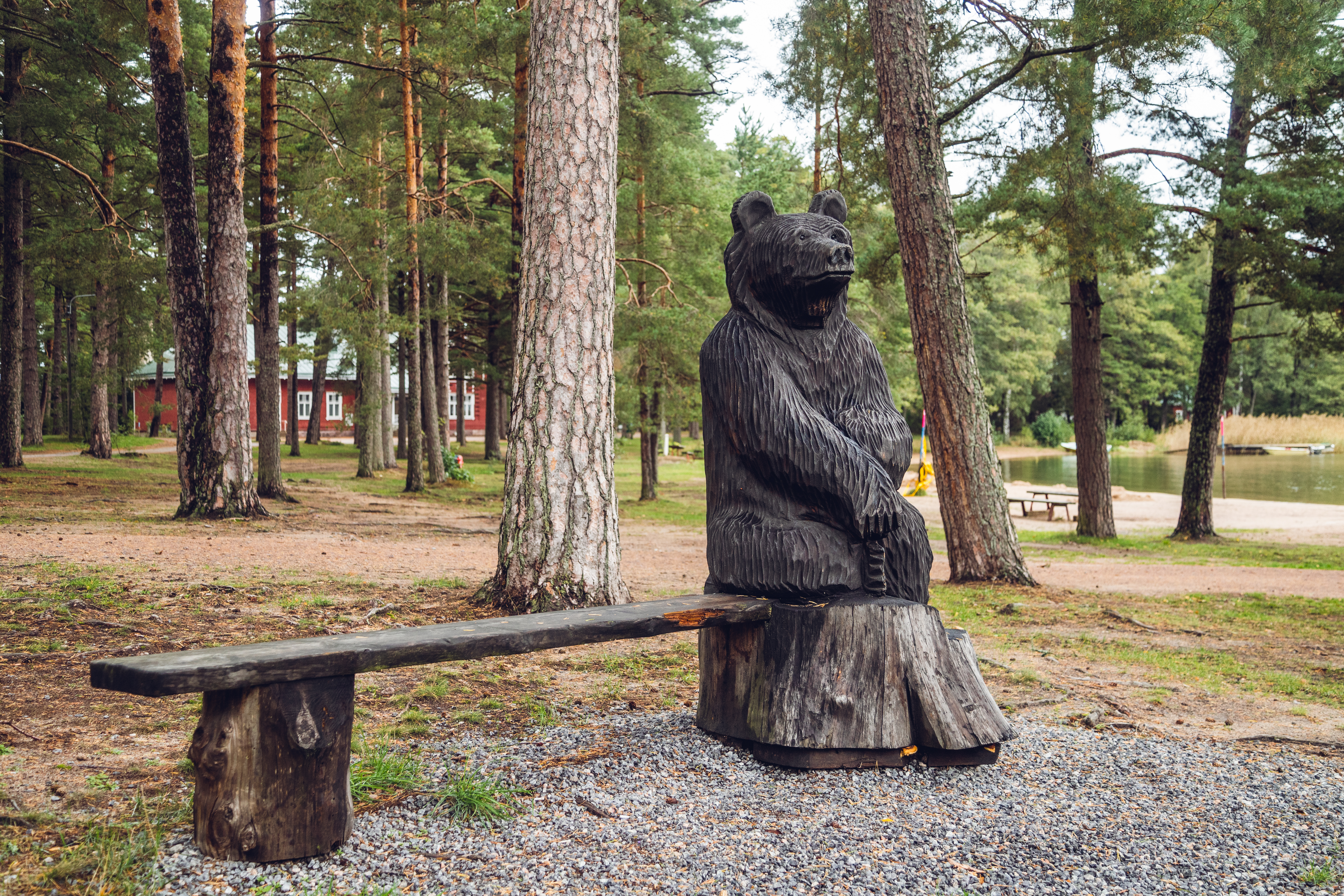 Nagu-Nalle stigen björn bänk